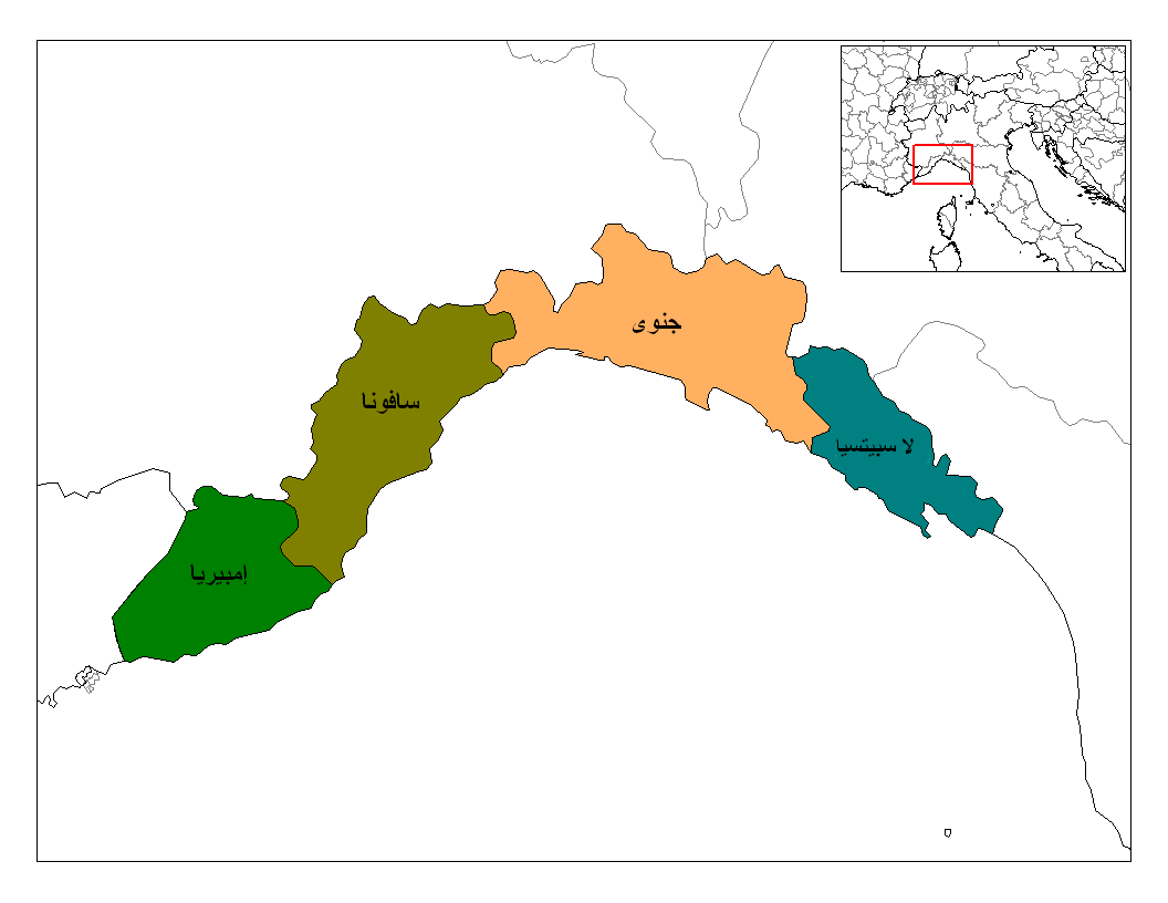 مقاطعات ليغوريا